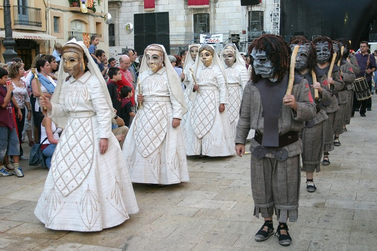 ball dels set pecats capitals a la Plaça la Font de tarragona